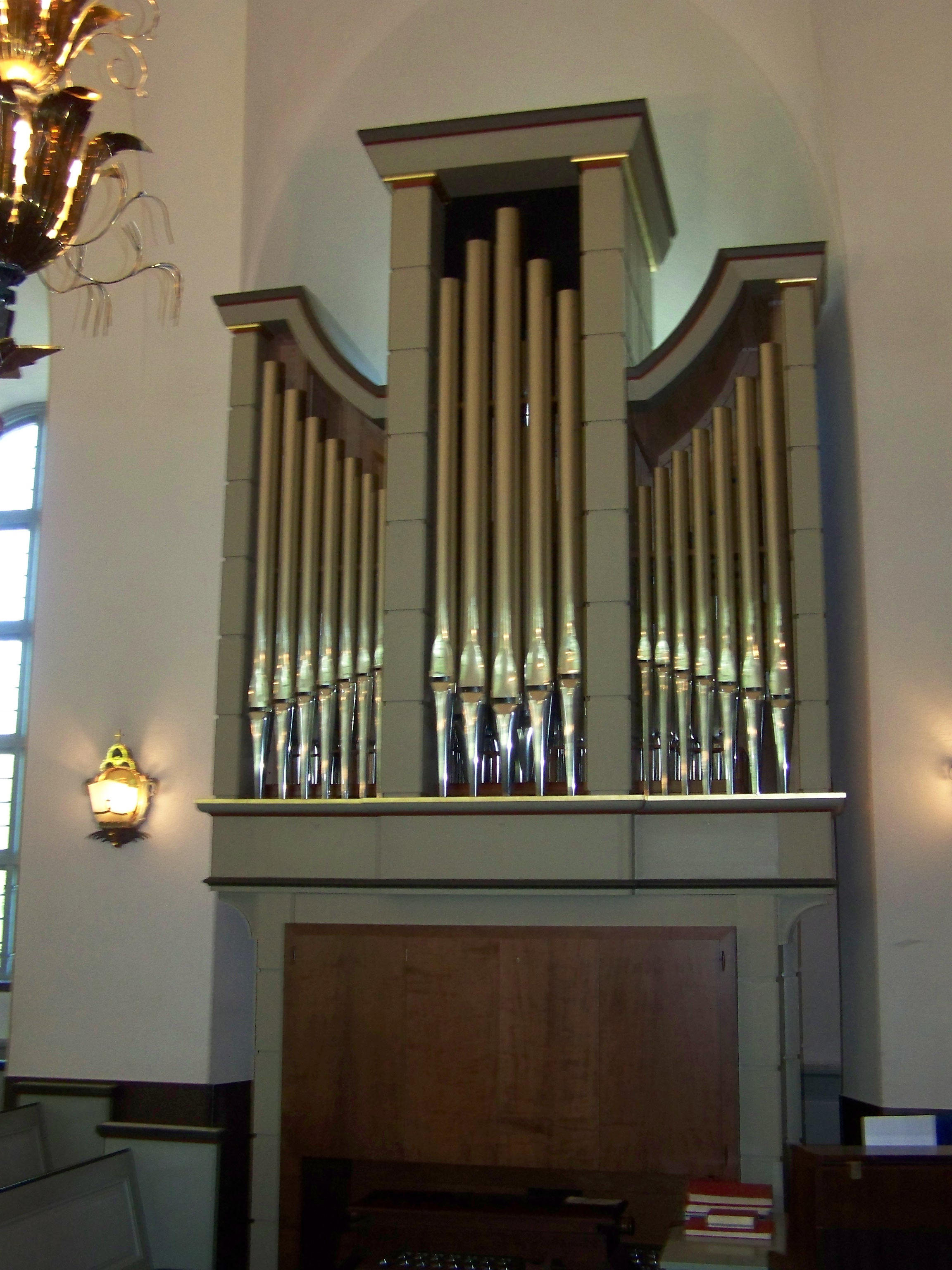 In Kallinge, Schweden. Kirche in Älmhult.